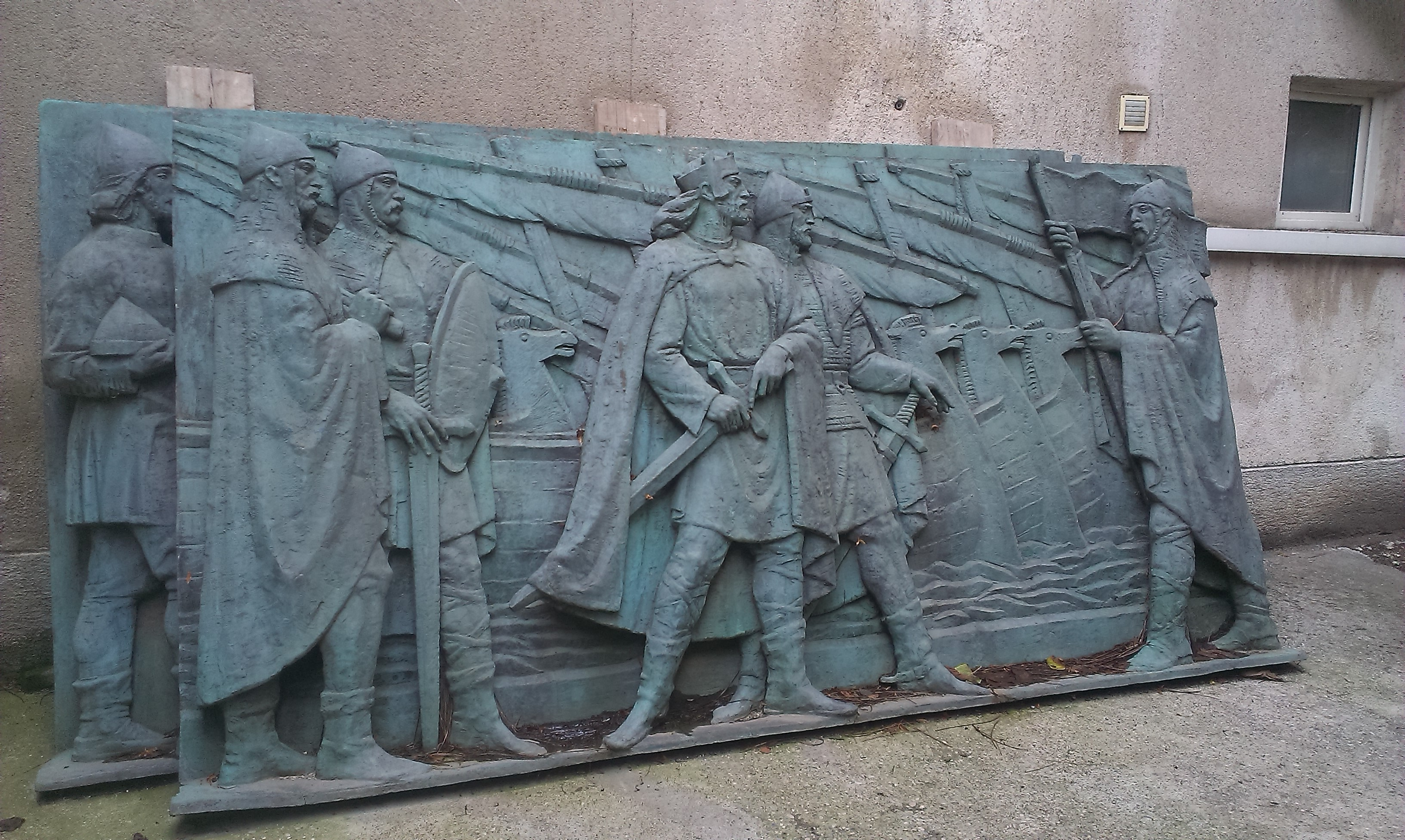 Srpskohrvatski / српскохрватски: Reljef "Hrvatska mornarica" s postolja spomeniku kralju Tomislavu koji stoji odbačen u dvorištu palače Grlečić Jelačić